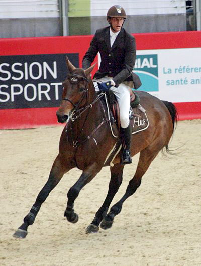 Kevin Staut et Zeta de Hus lors du Grand Prix Coupe du monde du CSIW-5* de Lyon (octobre 2011).